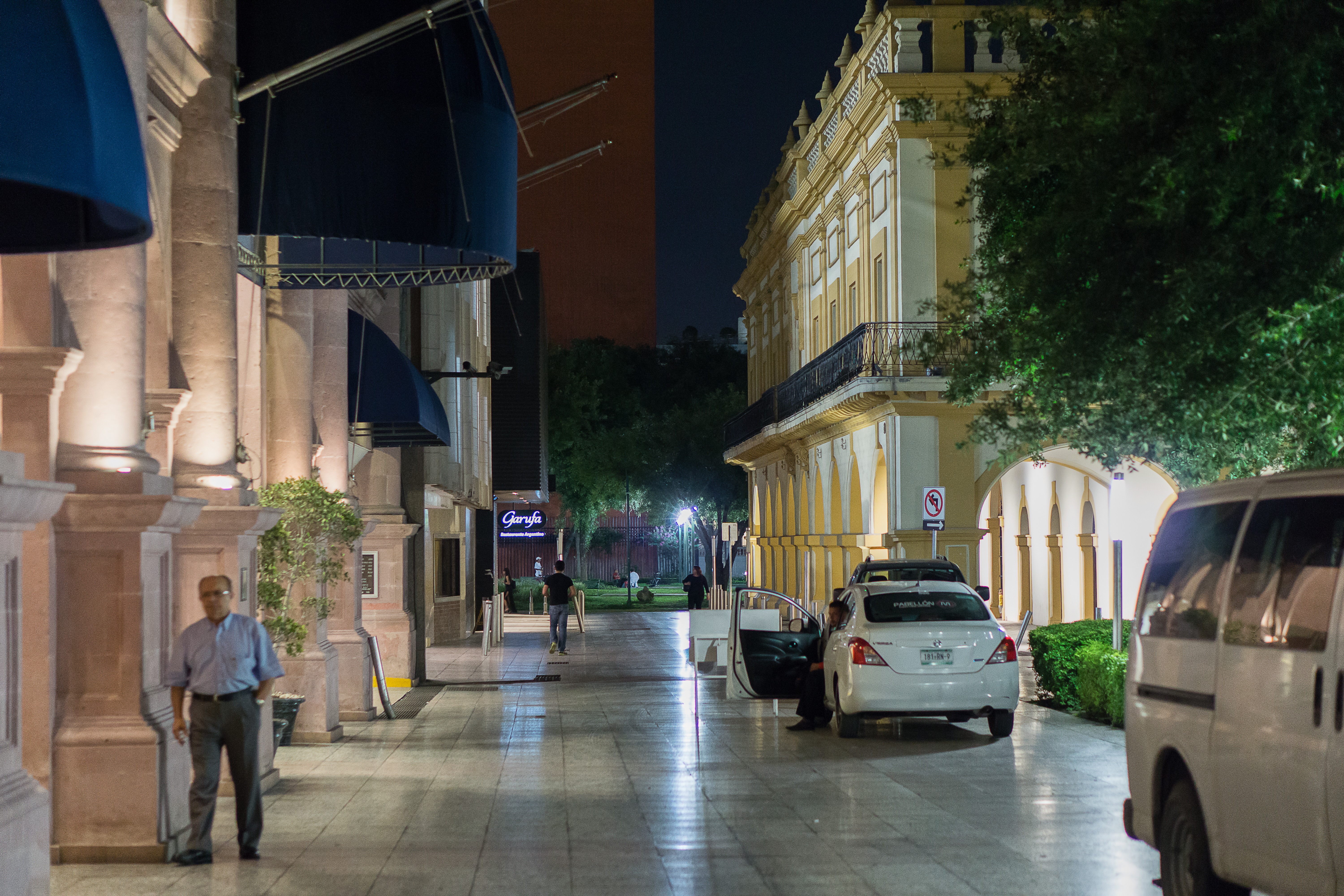 Calle en el centro de Monterrey.